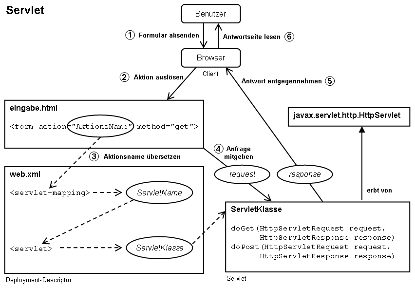 Beispiel / Diagramm für Java Web-Anwendung mit Servlet